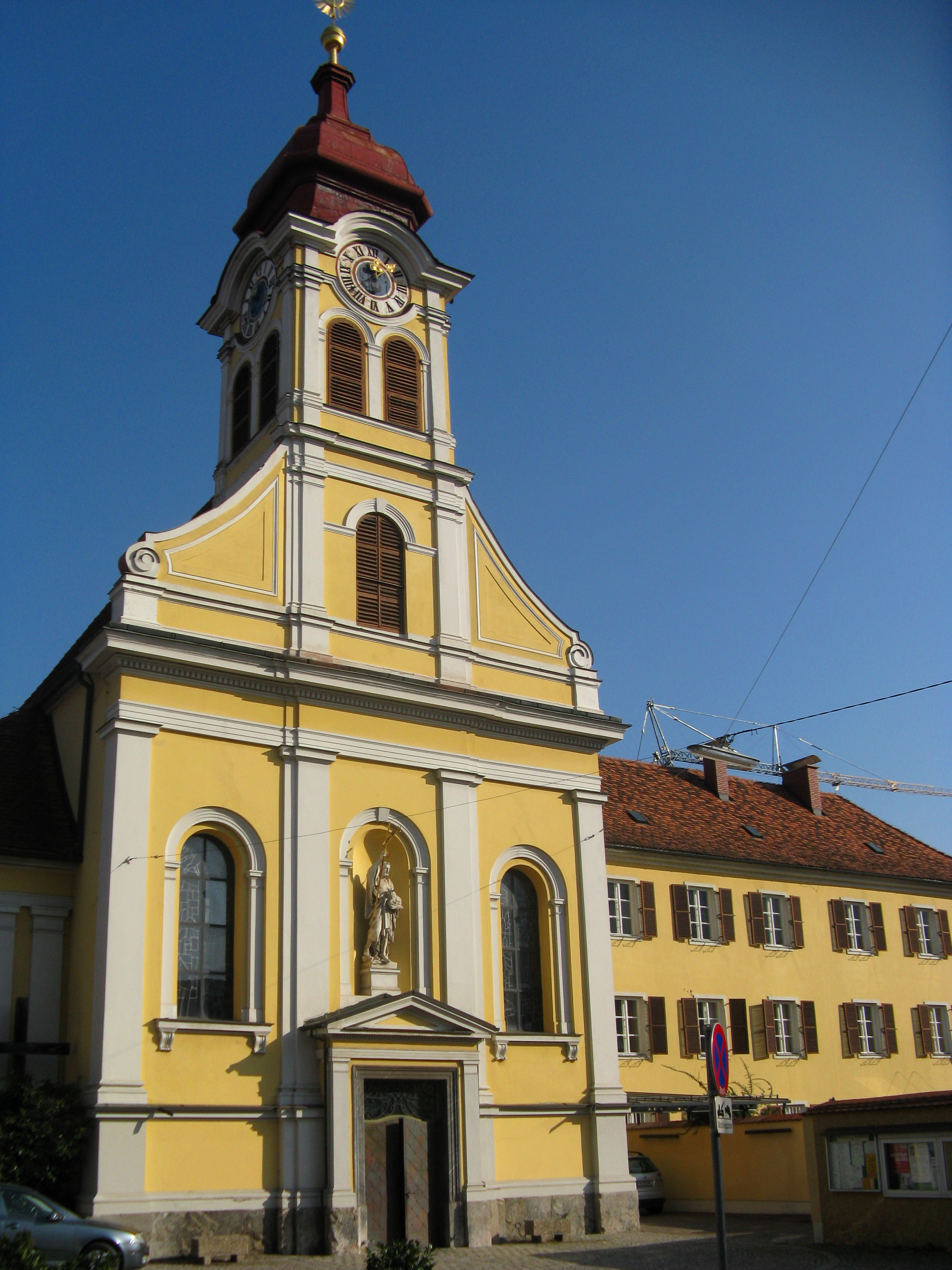 Kath. Pfarr- und Klosterkirche hl. Johannes der Täufer am Graben